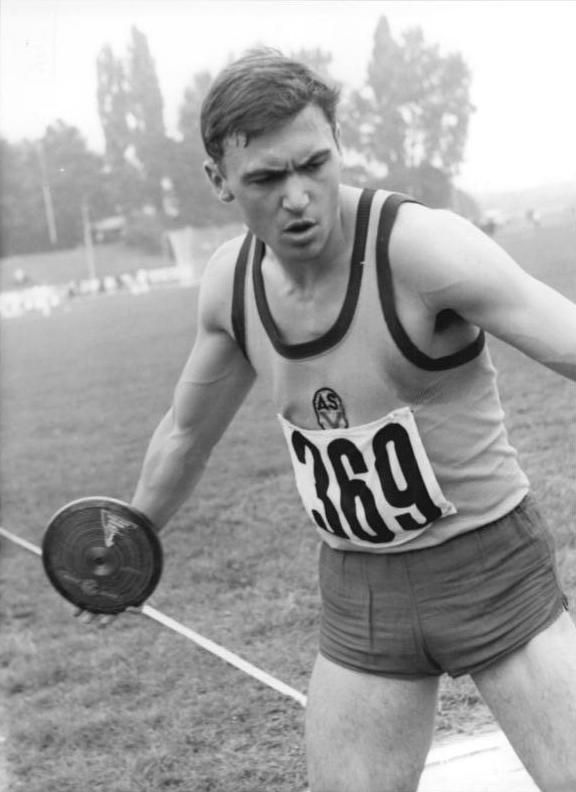 Joachim Kirst ADN-ZB Deutsche Demokratische Republik 23.6.1972 schw Zehnkämpfer Joachim Kirst. Er gehört dem Sportclub ASK Vorwärts Potsdam an. Unser Foto zeigt ihn beim Diskuswerfen während eines früheren Wettbewerbs. Foto: Koch Copyright: ADN-Zentralbild